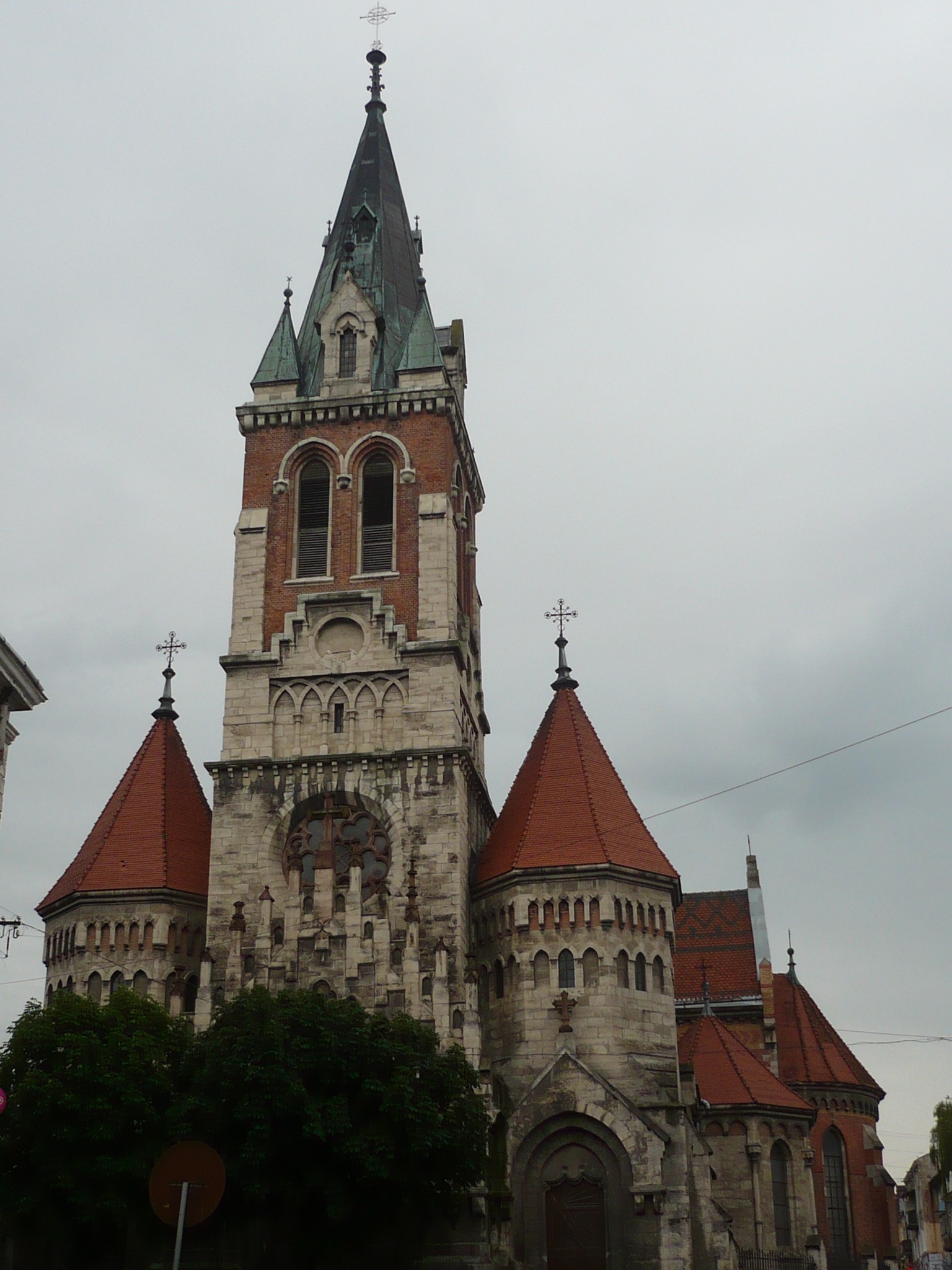 Czortków. Kościół pw. św. Stanisława